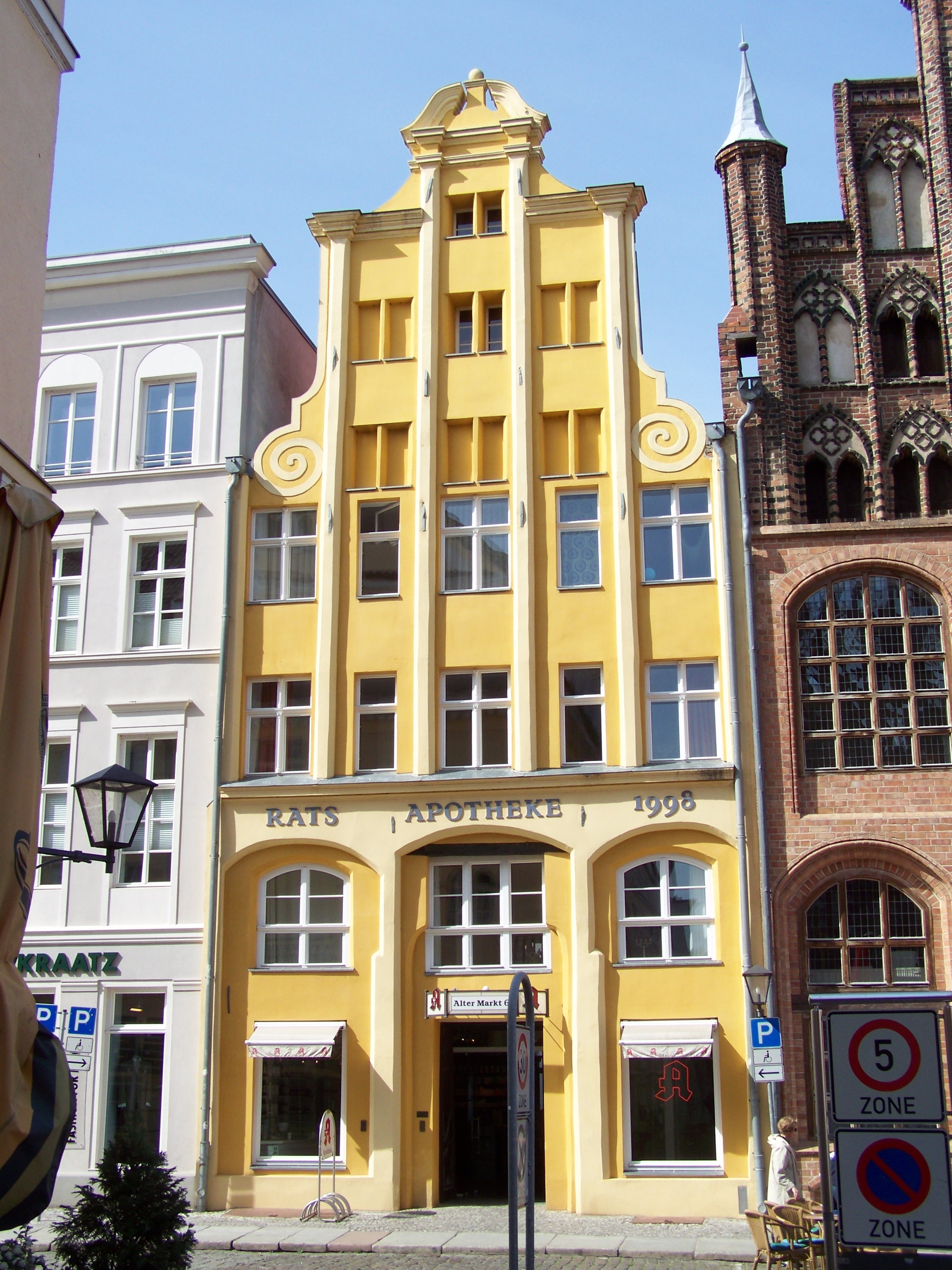 Gebäude am Alten Markt in Stralsund